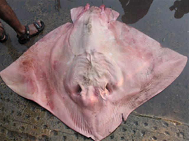 вид скатов рода хвостоколов